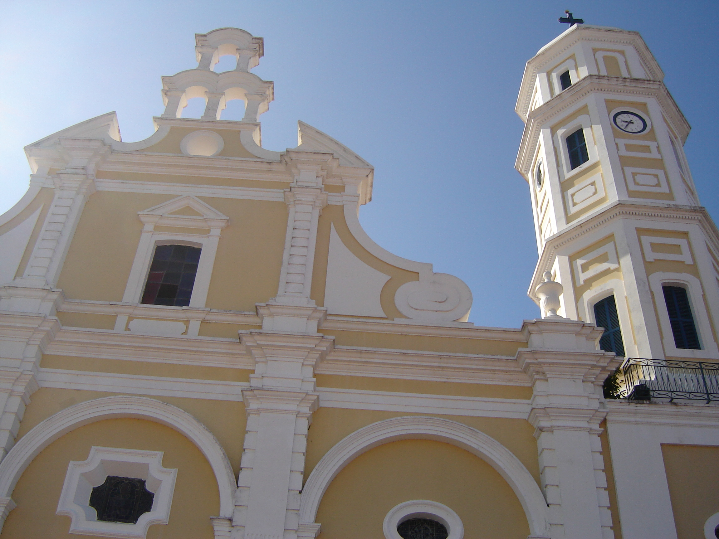 Ciudad Bolívar Cathedral